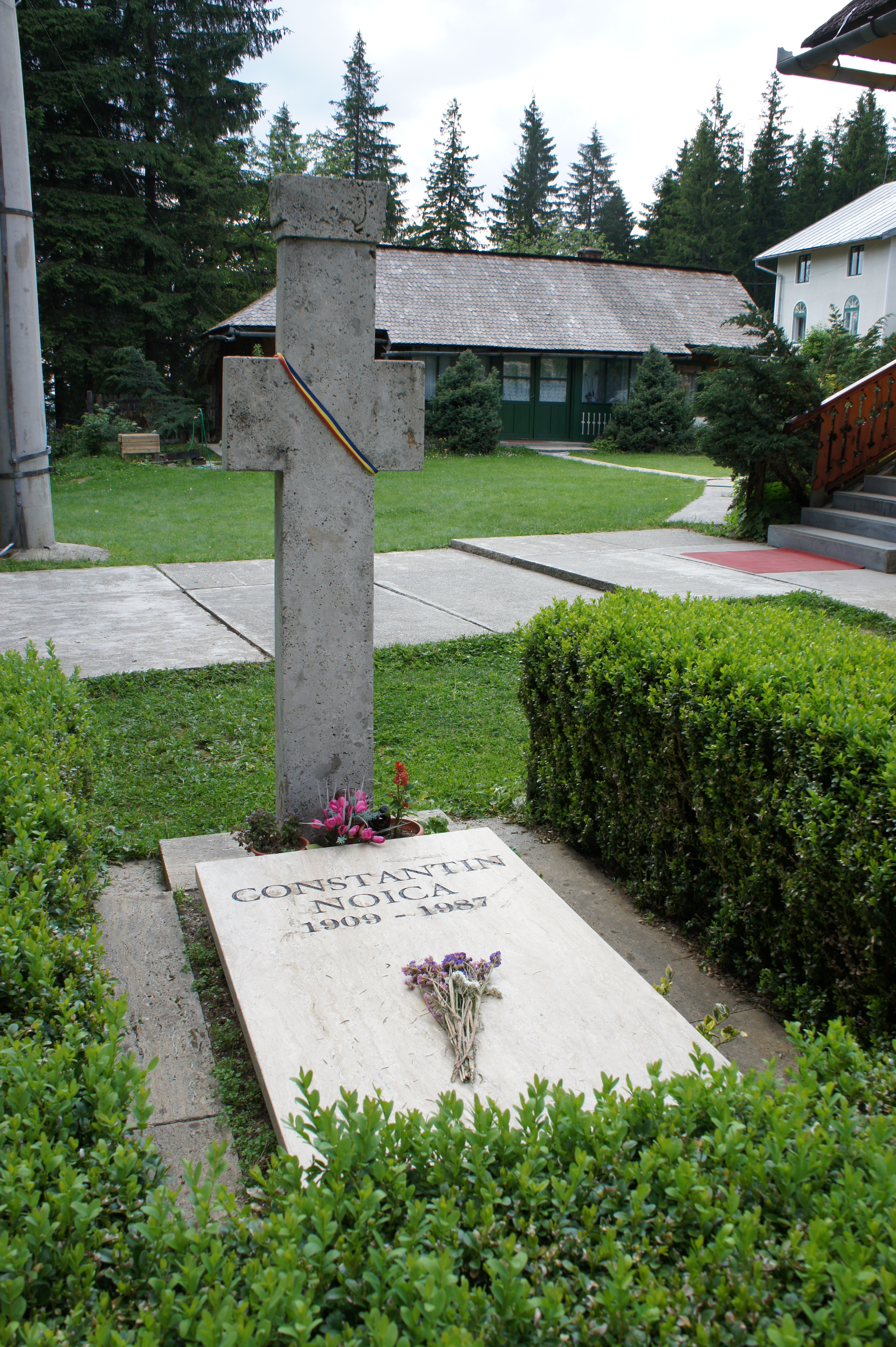 mormântul lui Constantin Noica